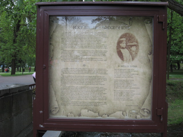 Vrnjacka Banja